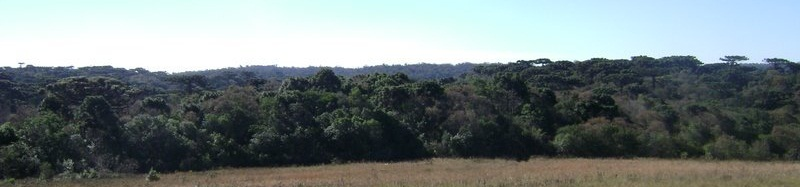 Reserva Florestal de Nonoai (Planalto - RS / Brasil)